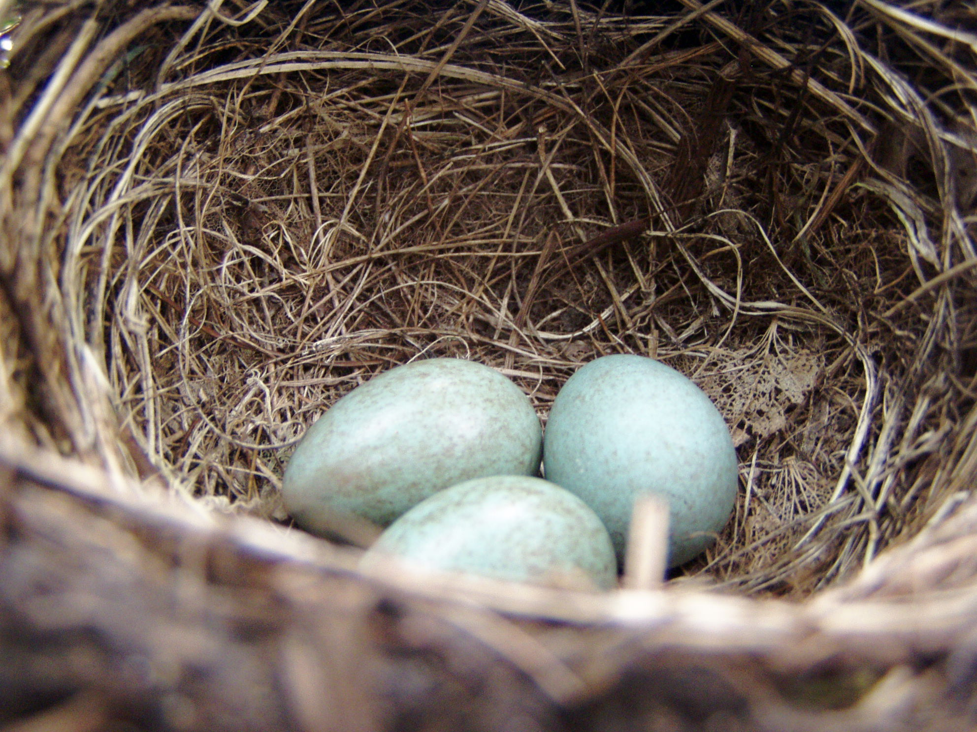 Merelnest met eieren, zelf gemaakt.